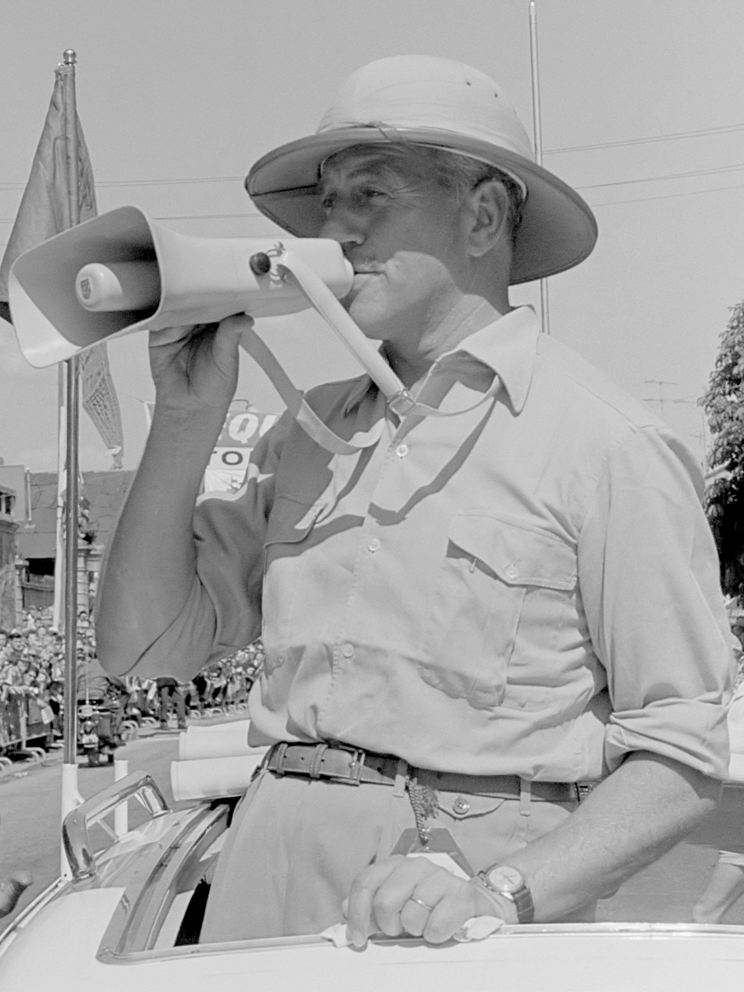 Tour de France 1962, 49ste keer. Jacques Goddet in wagen.